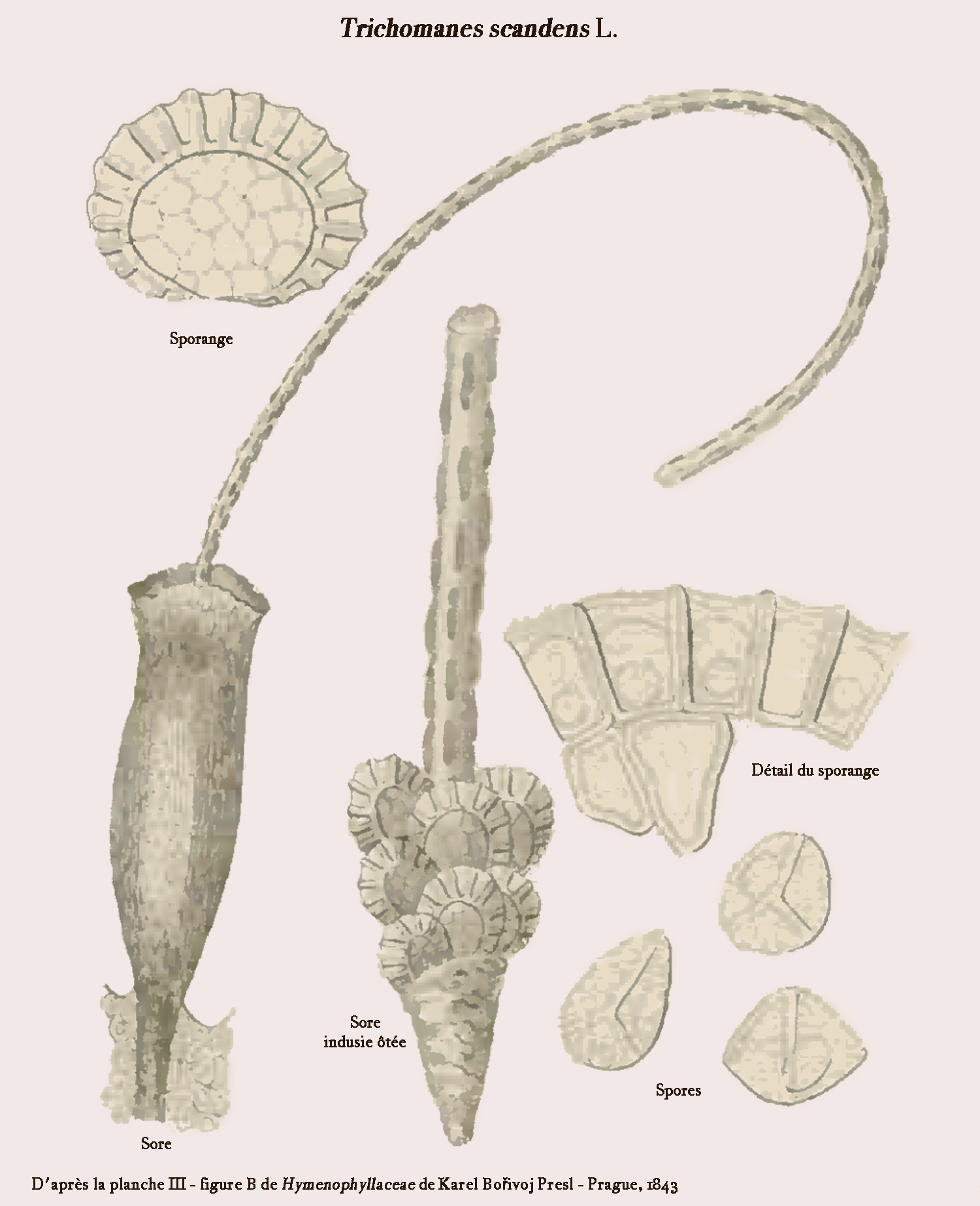 Trichomanes scandens - D'après la planche III - figure B de Hymenophyllaceae de Karel Bořivoj Presl - Prague, 1843